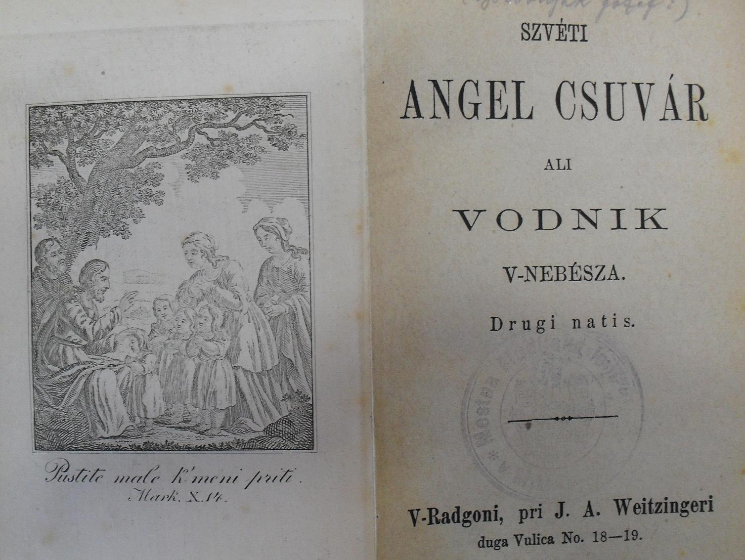 József Borovnyák: Szvéti angel csuvár (Holy Guardian Angel) prekmurian prayer book from 1890 (2. issue)